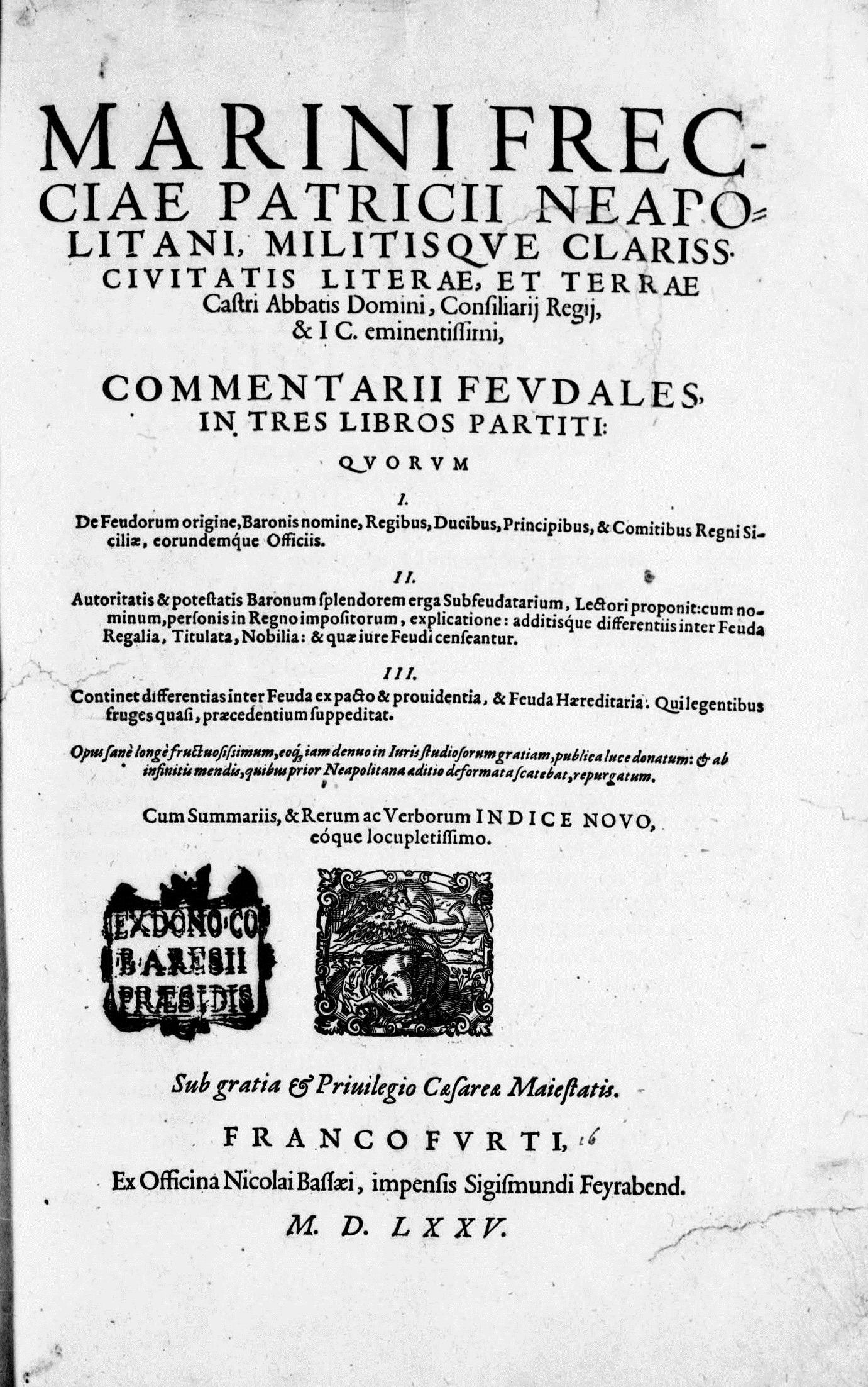 Frontespizio